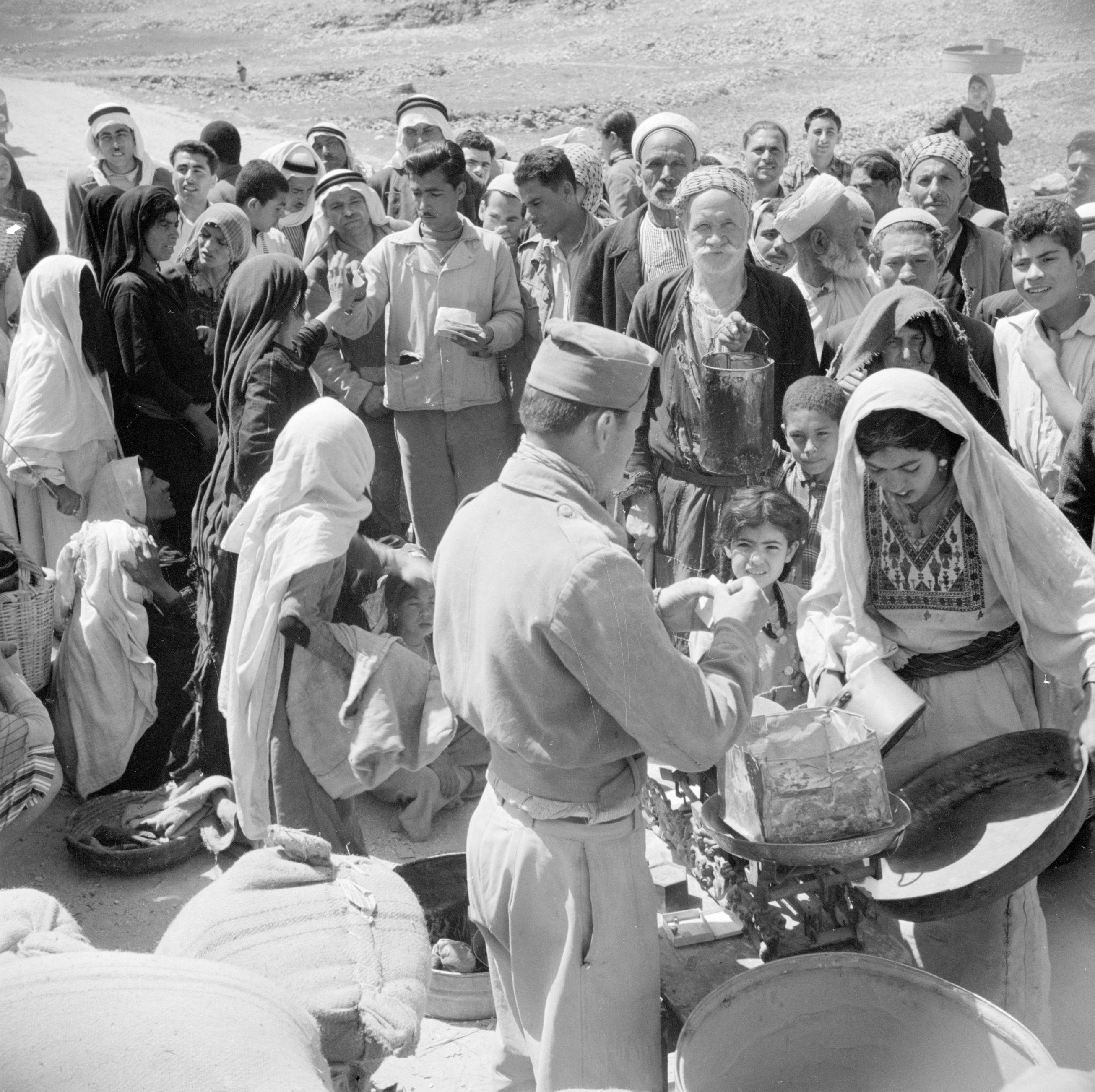 Collectie / Archief : Fotocollectie Van de Poll Reportage / Serie : Midden-Oosten 1950-1955: Jordanië Beschrijving : Distributie van voedsel in het vluchtelingen kamp Jalazoune nabij Ramallah Annotatie : Ten tijde van de opname lag deze plaats in Jordanië Datum : 1950 Locatie : Palestine, Jordanië, Ramallah Trefwoorden : kampen, vluchtelingen, voedseldistributies Fotograaf : Poll, Willem van de Auteursrechthebbende : Nationaal Archief Materiaalsoort : Negatief (zwart/wit) Nummer archiefinventaris : bekijk toegang 2.24.14.02 Bestanddeelnummer : 255-5727